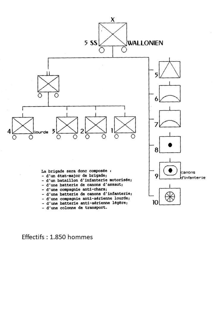 Organigramme de la brigade d'assaut Wallonie